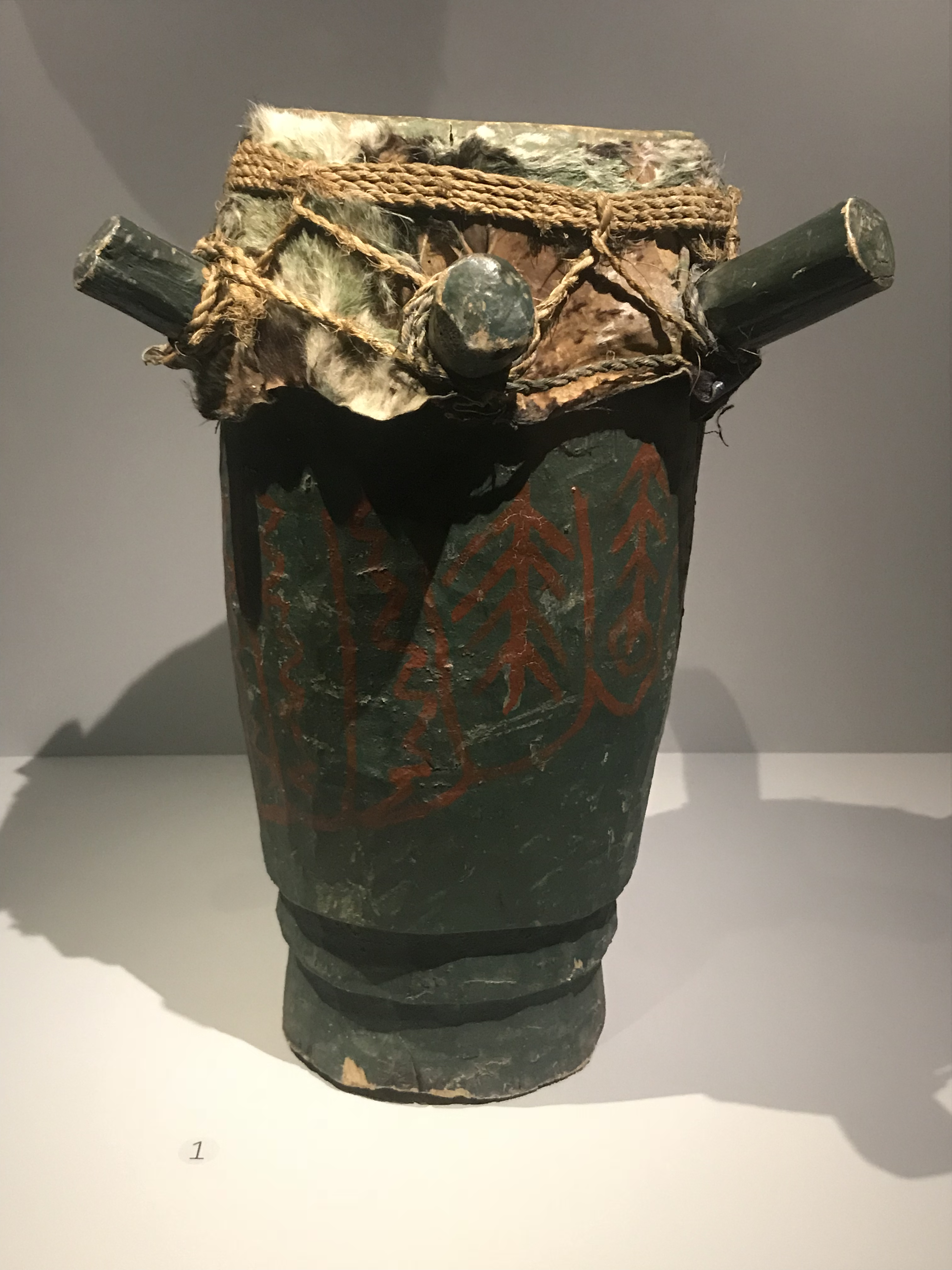 Tambour Boula (Haïti).